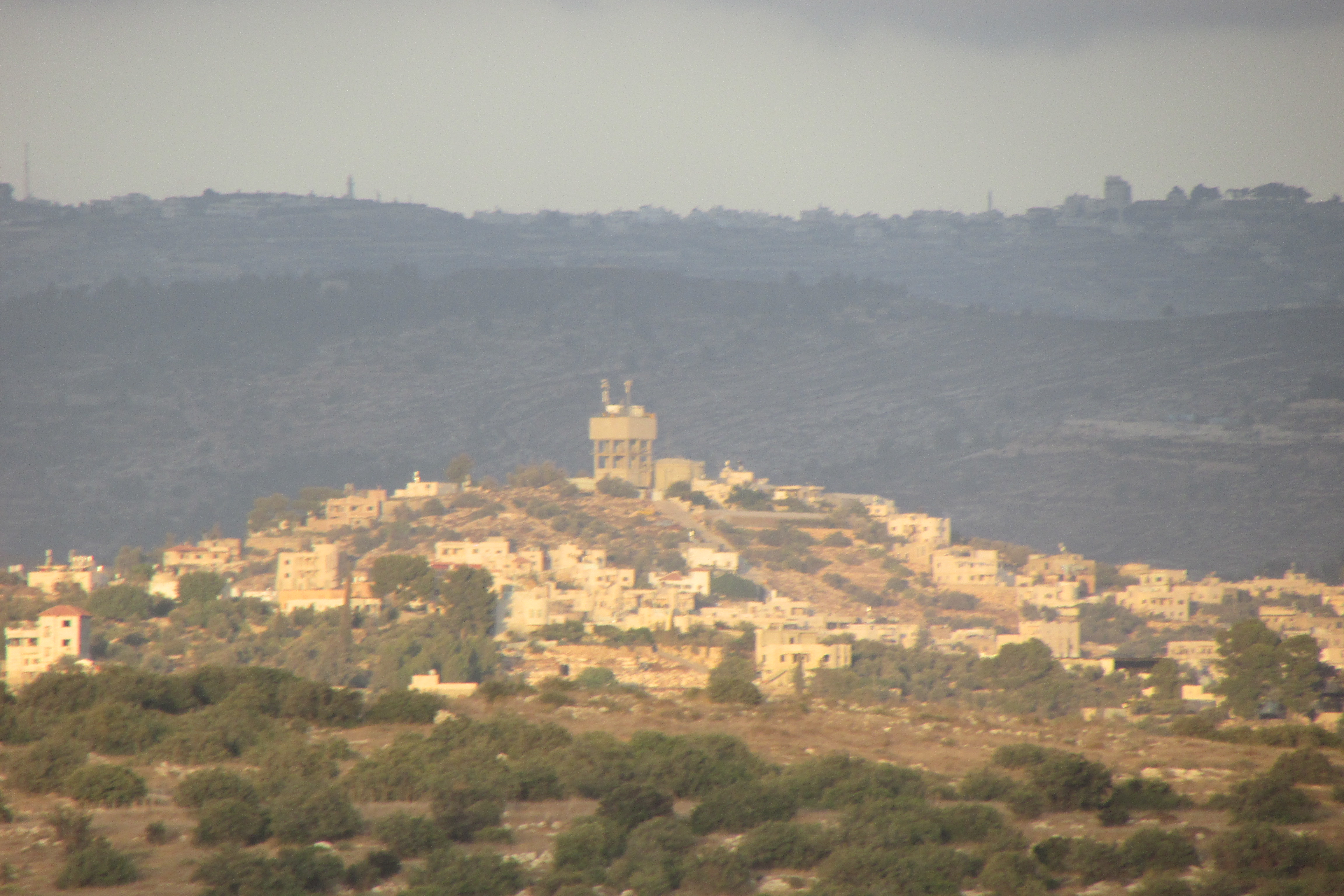 Idhna